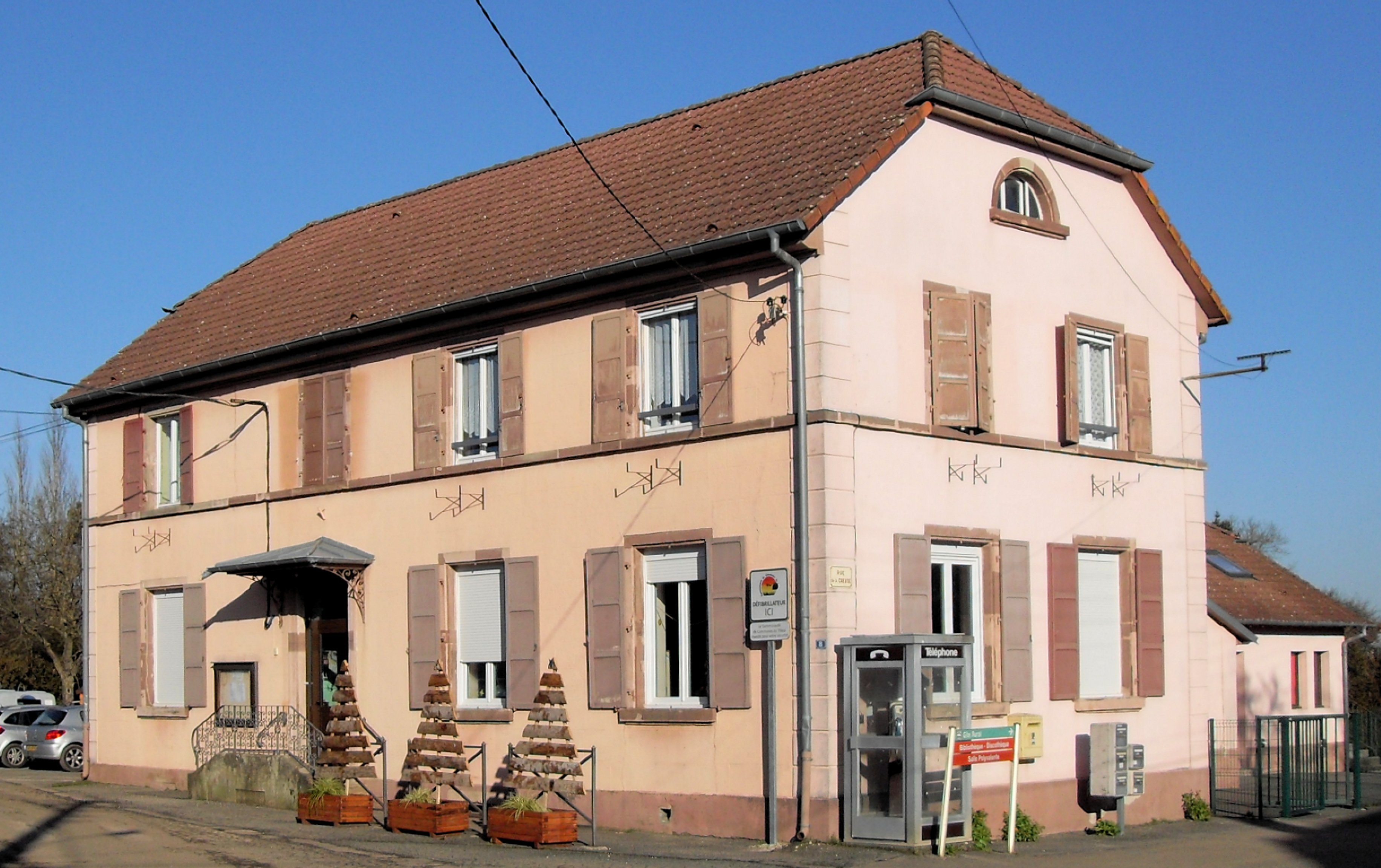 La mairie d'Eguenigue